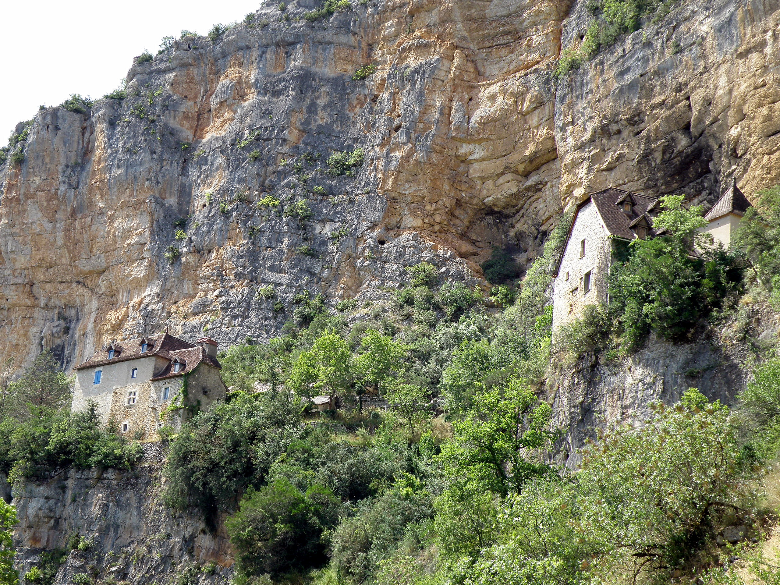 Sauliac-sur-Célé, commune et village dans le département du Lot (région Midi-Pyrénées, France), situés sur le Célé, affluent droit du Lot. Maisons au pied de la falaise, formant le Vieux Sauliac, à quelques centaines de mètres en aval du village.